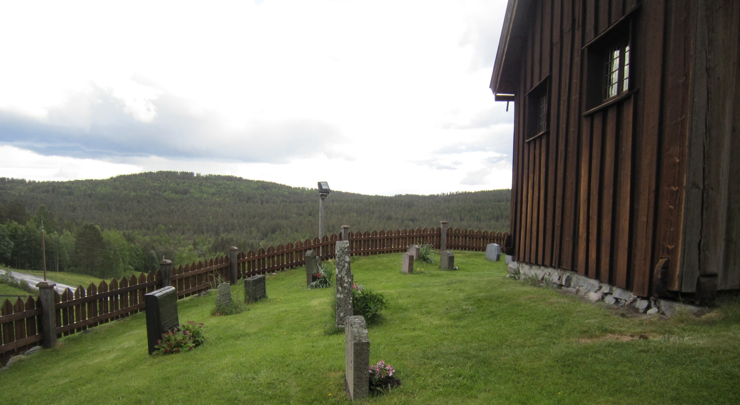 Fylkesvei 131 forbi Vatnås kirke i Sigdal kommune